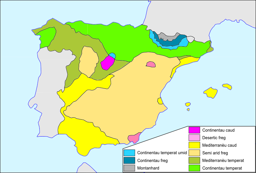 Zònas climaticas principalas d'Espanha.